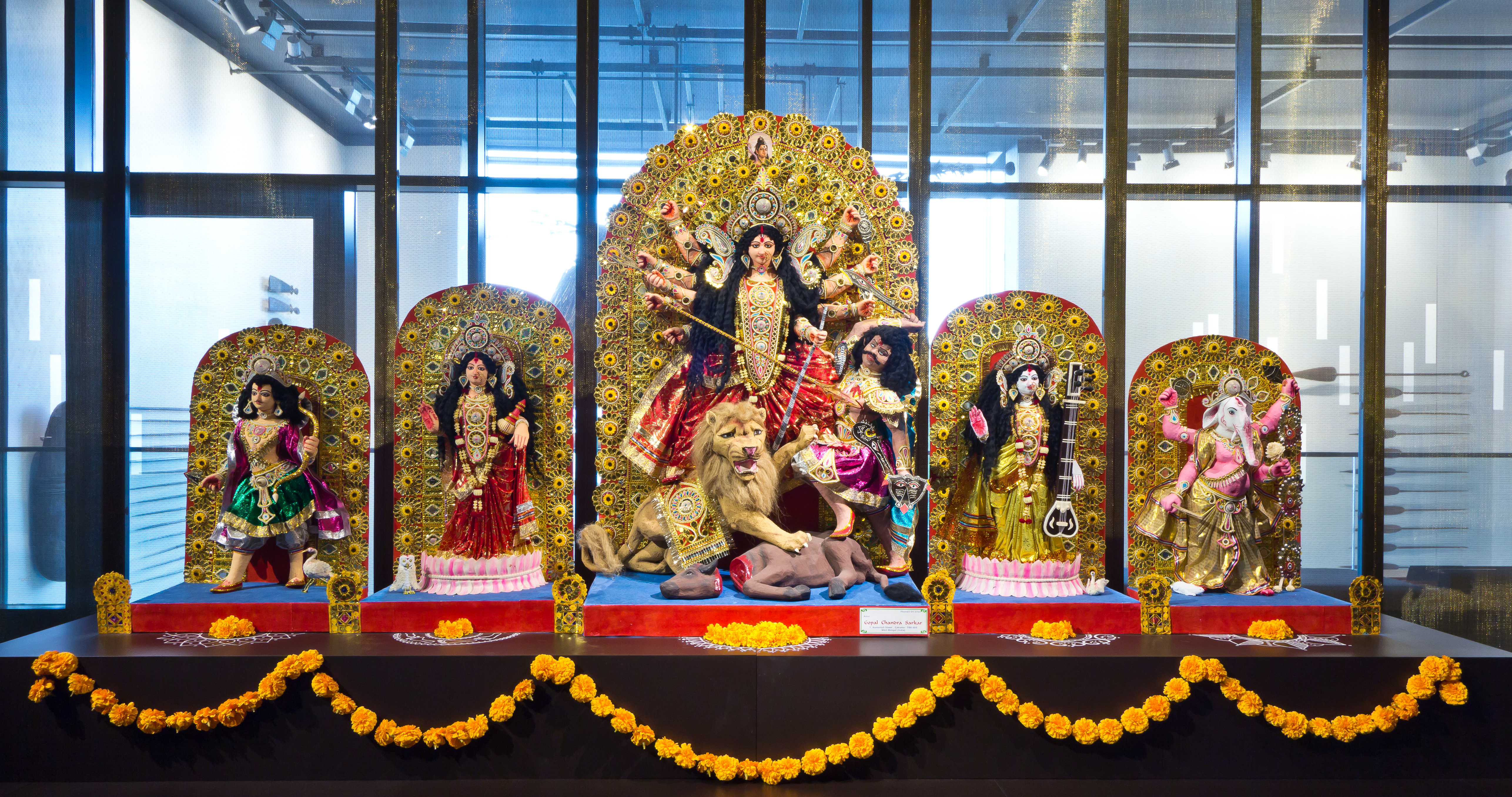 Durga-Altar, Kolkata, Westbengalen, Ostindien, Südasien. Die Göttin Durga stellt den kriegerischen Aspekt von Parvati, der Gemahlin Shivas, dar. Ihr siegreicher Kampf gegen den Büffeldämon symbolisiert den Triumph des Guten über das Böse. Lakshmi, Sarasvati, der elefantenköpfige Ganesha und der Kriegsgott Karttikeya flankieren sie.